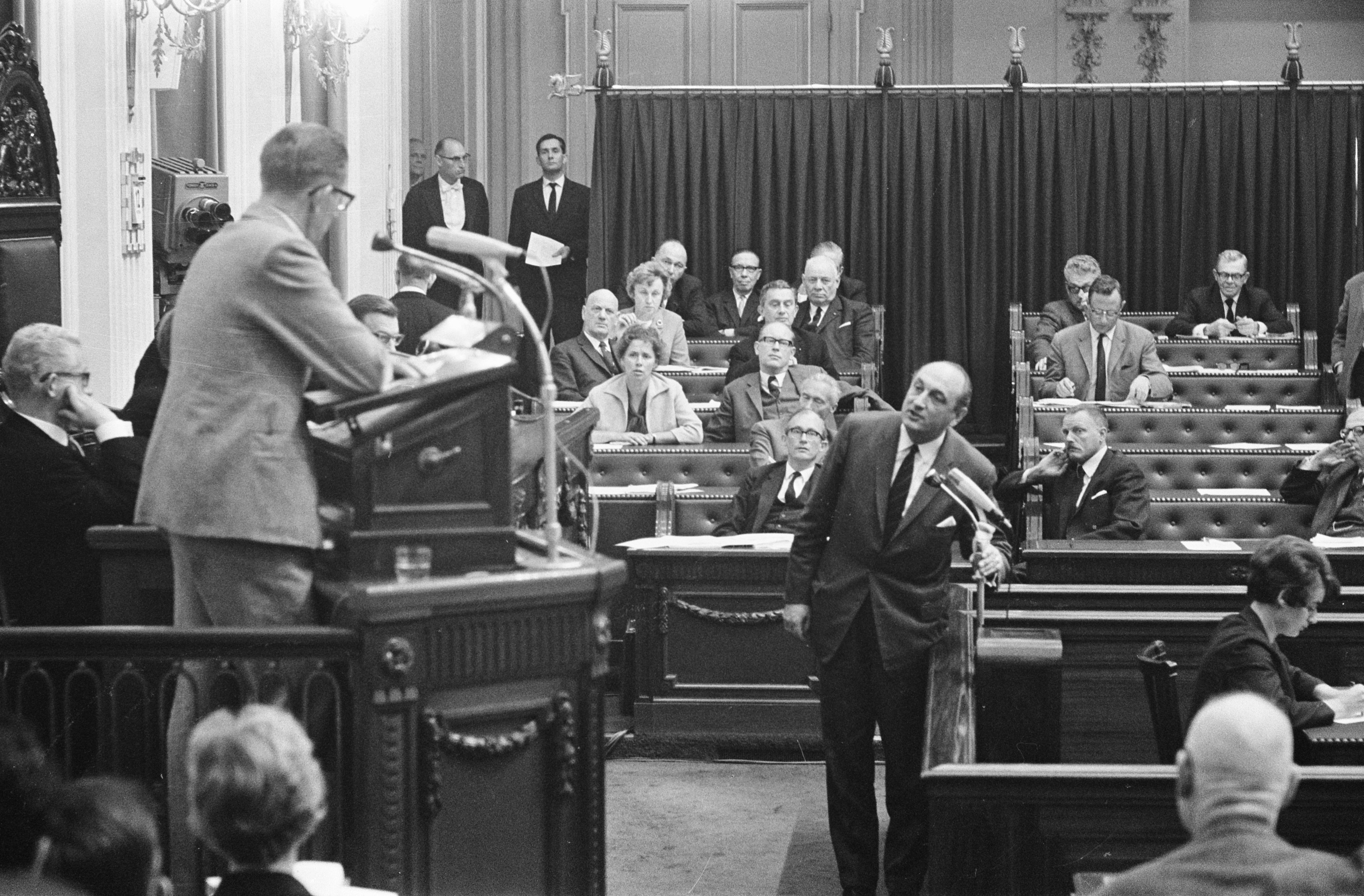 Collectie / Archief : Fotocollectie Anefo Reportage / Serie : De Tweede Kamer tijdens de behandeling van de overheidsbegroting Beschrijving : Lid van de Tweede Kamer voor de VVD dhr. Edzo Toxopeus interrumpeert de fractievoorzitter van de Boerenpartij dhr. H. Koekoek Datum : 12 oktober 1966 Locatie : Den Haag, Zuid-Holland Trefwoorden : overheidsbegrotingen, parlementaire debatten, parlementariërs, politiek Persoonsnaam : Koekoek, Hendrik, Toxopeus, Edzo Fotograaf : Fotograaf Onbekend / Anefo Auteursrechthebbende : Nationaal Archief Materiaalsoort : Negatief (zwart/wit) Nummer archiefinventaris : bekijk toegang 2.24.01.05 Bestanddeelnummer : 919-6733